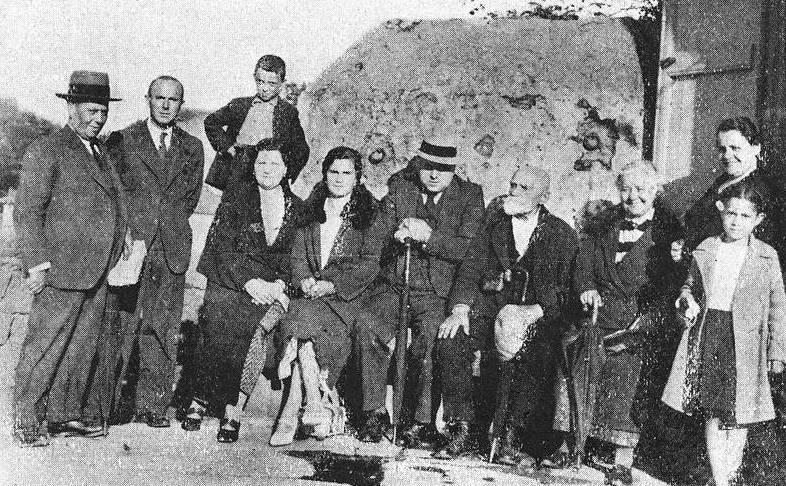 Los Amantes del Campo con Manuel Insua Santos, fotografía en Vida Gallega 1935